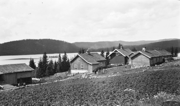 Katnosa gård 1910